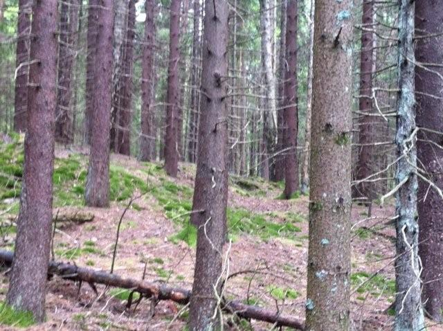 Gallrad granskog. Foto Karl-Göran Enander